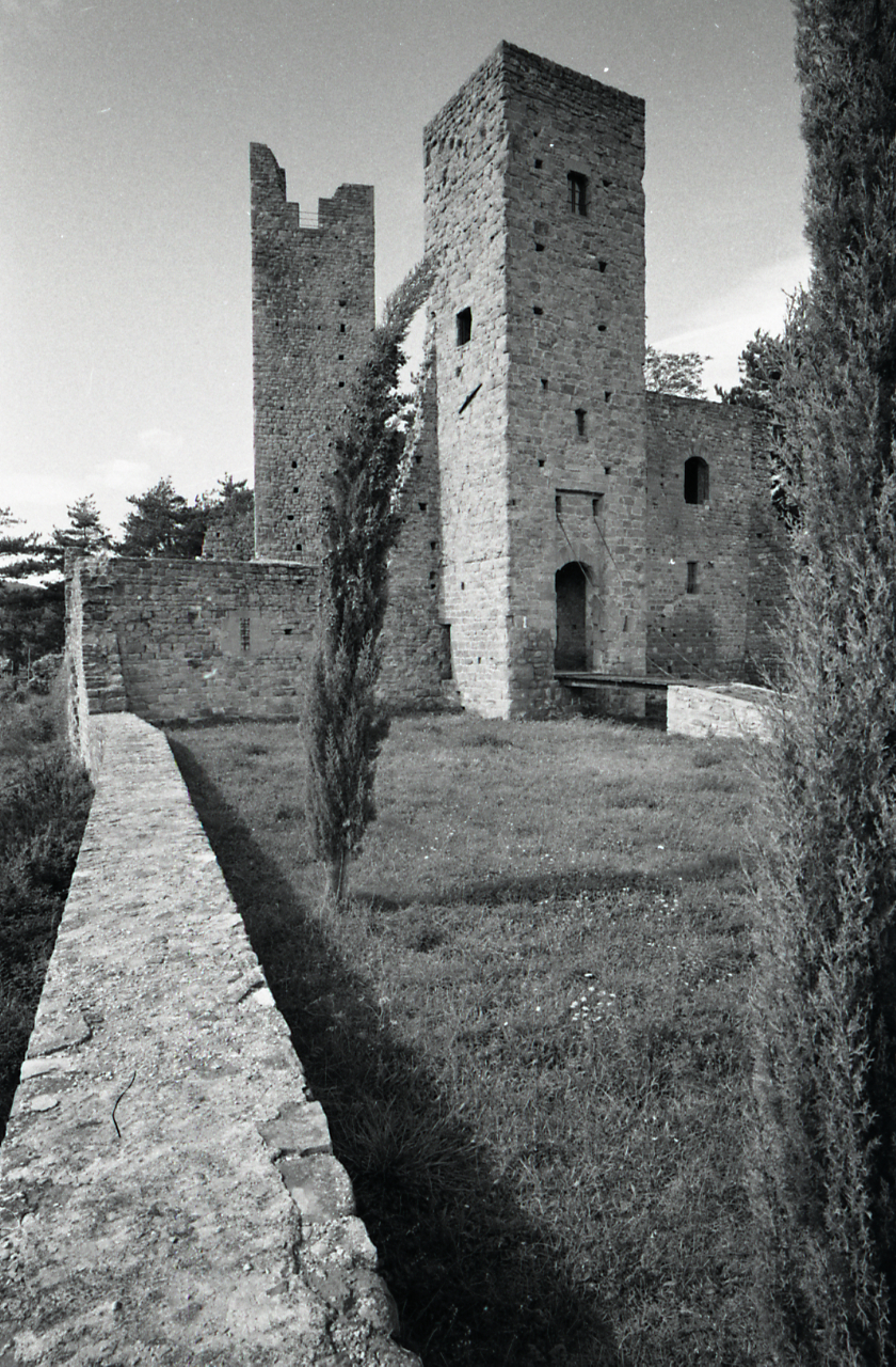 Casentino. Castello di Romena. Servizio fotografico : Firenze, 1965 / Paolo Monti. - Strisce: 1, Fotogrammi complessivi: 6 : Negativo b/n, gelatina bromuro d'argento/ pellicola ; 35 mm. - ((I fotogrammi hanno una doppia numerazione. - Sul portanegativi: Leica Plus X. - Occasione: Pubblicazione: "Emilio CECCHI, Natalino SAPEGNO (a cura di), Storia della Letteratura Italiana, 9 voll., Milano, Garzanti, 1966 e segg."